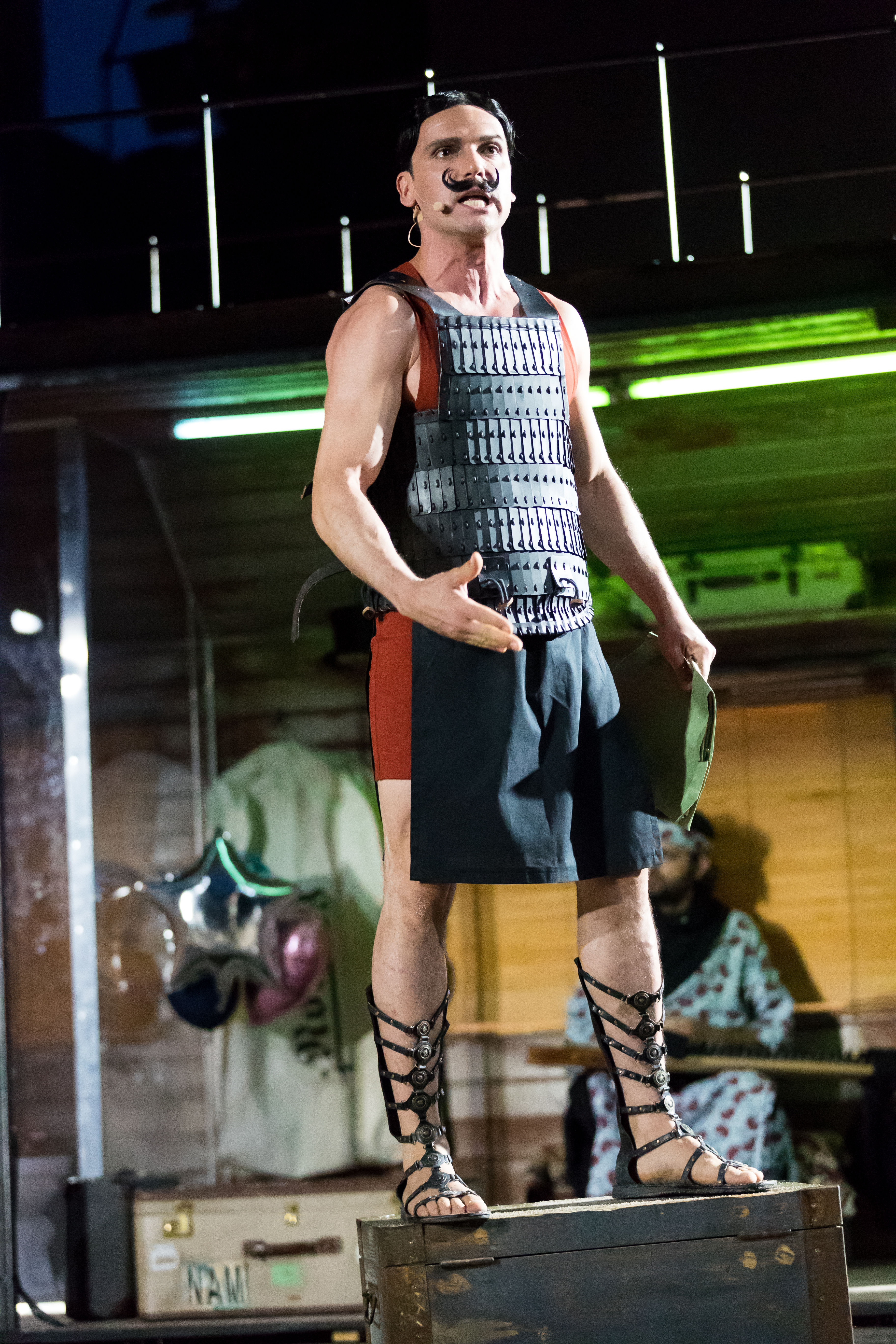 Sascha Göpel during Nibelungenfestspiele "GLUT. Siegfried von Arabien." at Rheinland-Pfalz, Worms, , Germany on 2017-08-01, Photo: Sven Mandel